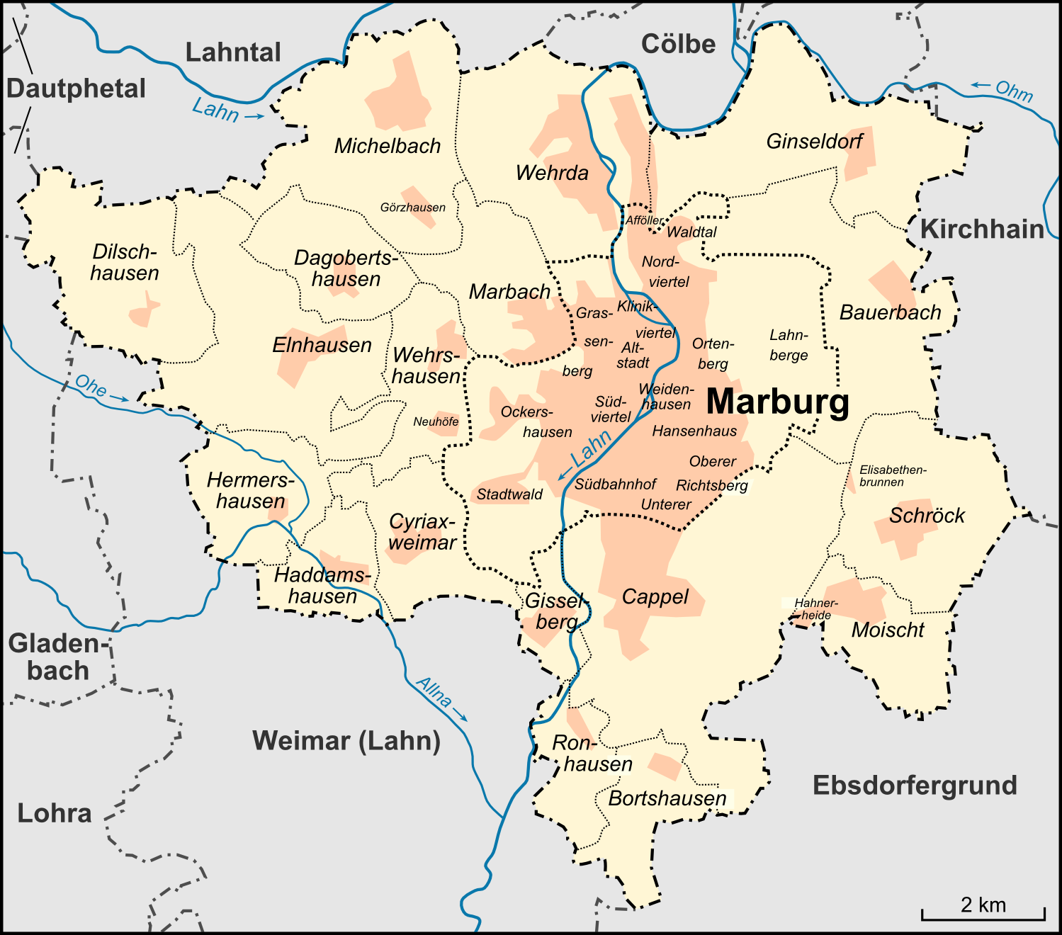 Karte der Stadtteile und Nachbargemeinden der Stadt Marburg